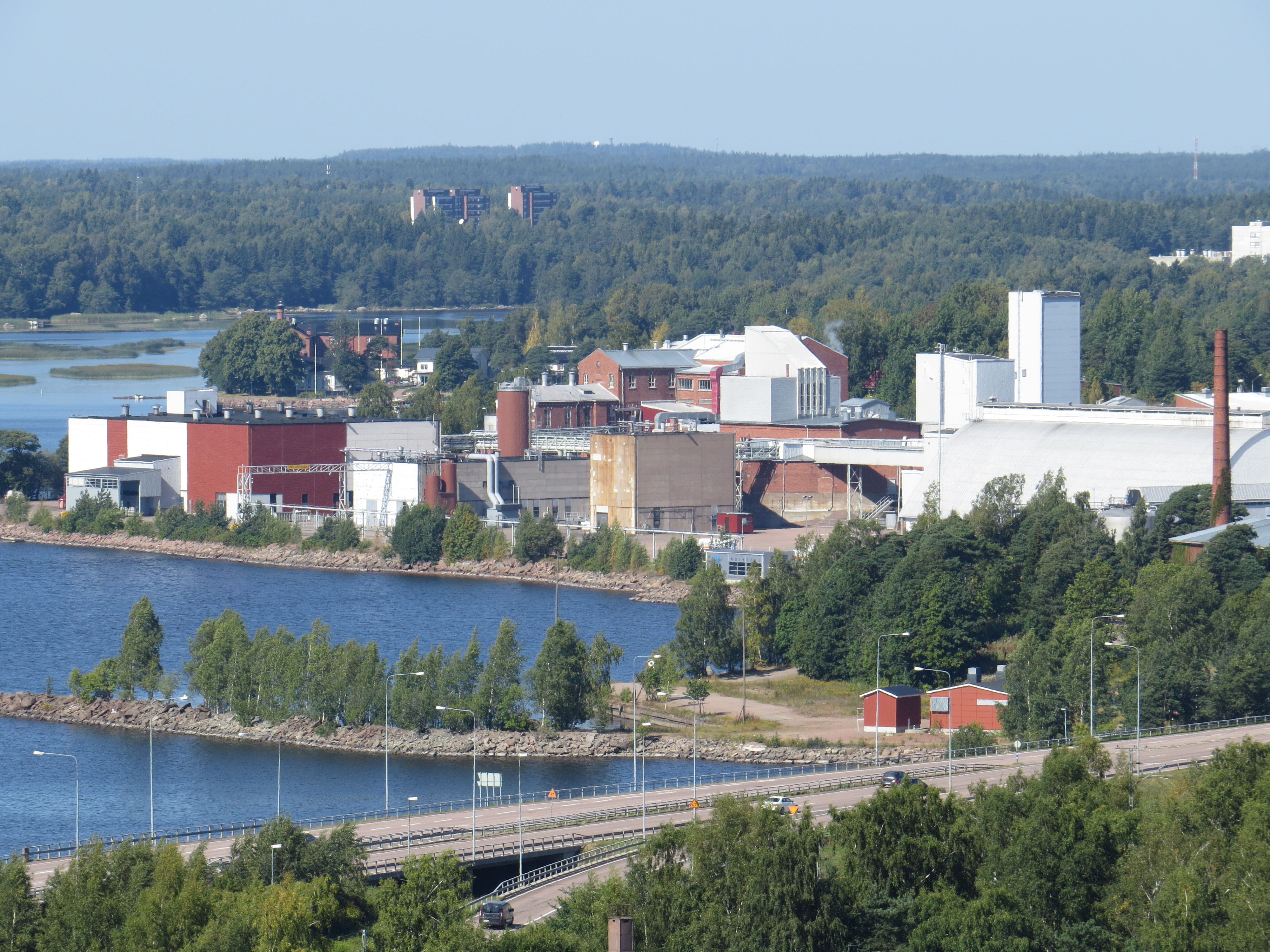 DuPont-konserniin kuuluva Danisco Sweeteners Oy:n tehdas Kotkassa Hovinsaaren kaupunginosassa.